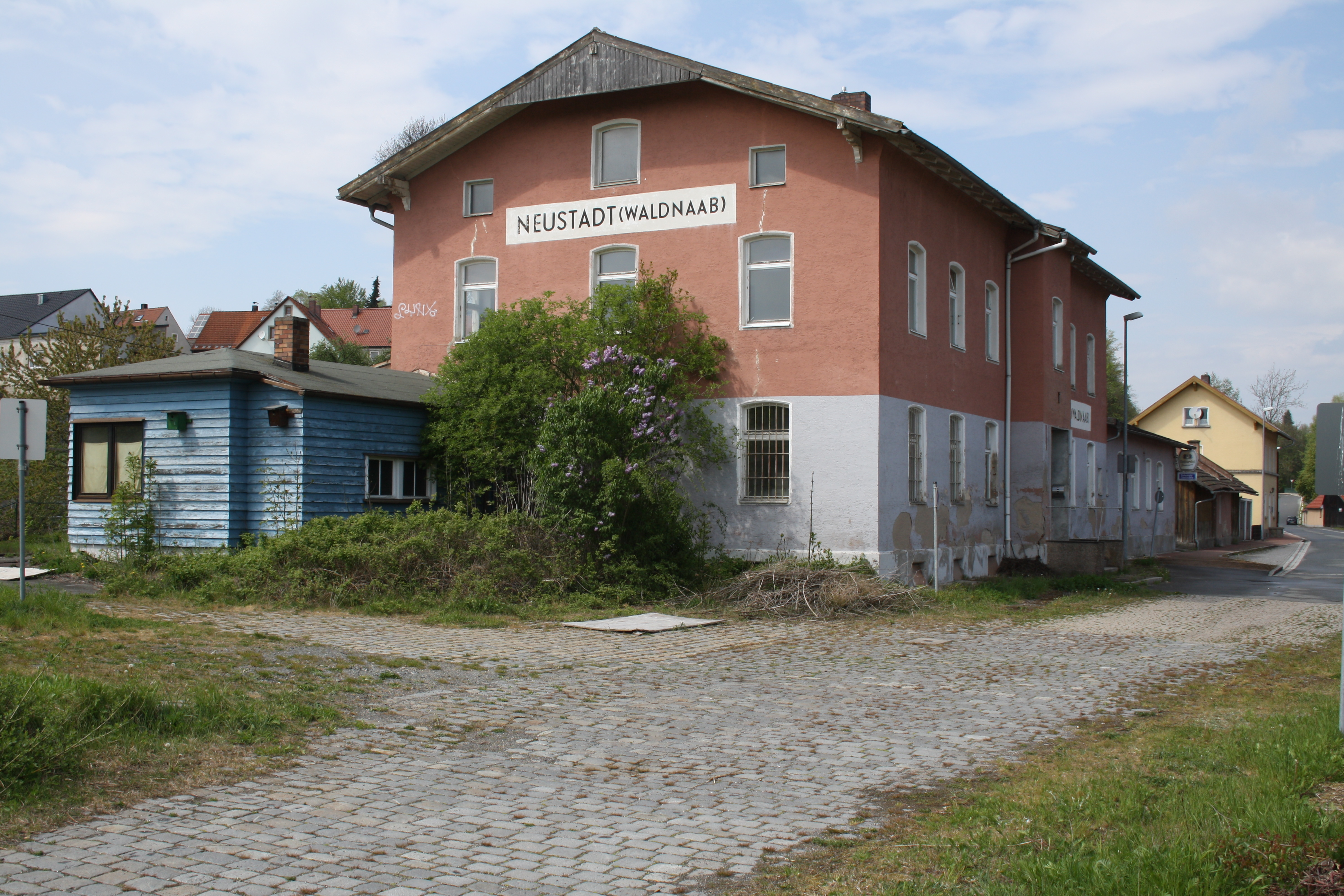 Ehem. Empfangsgebäude Bahnhof Neustadt (Waldnaab)